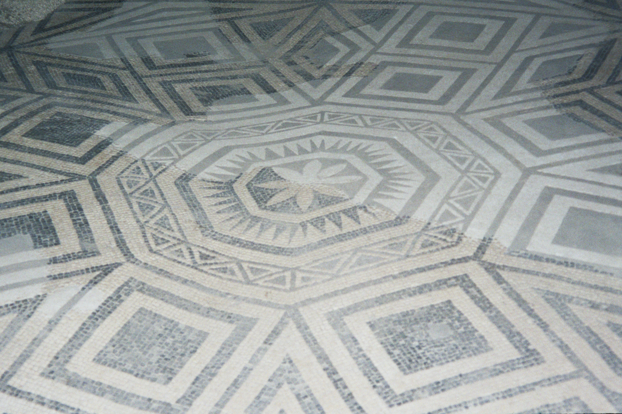 Particolare del cubicolo 2